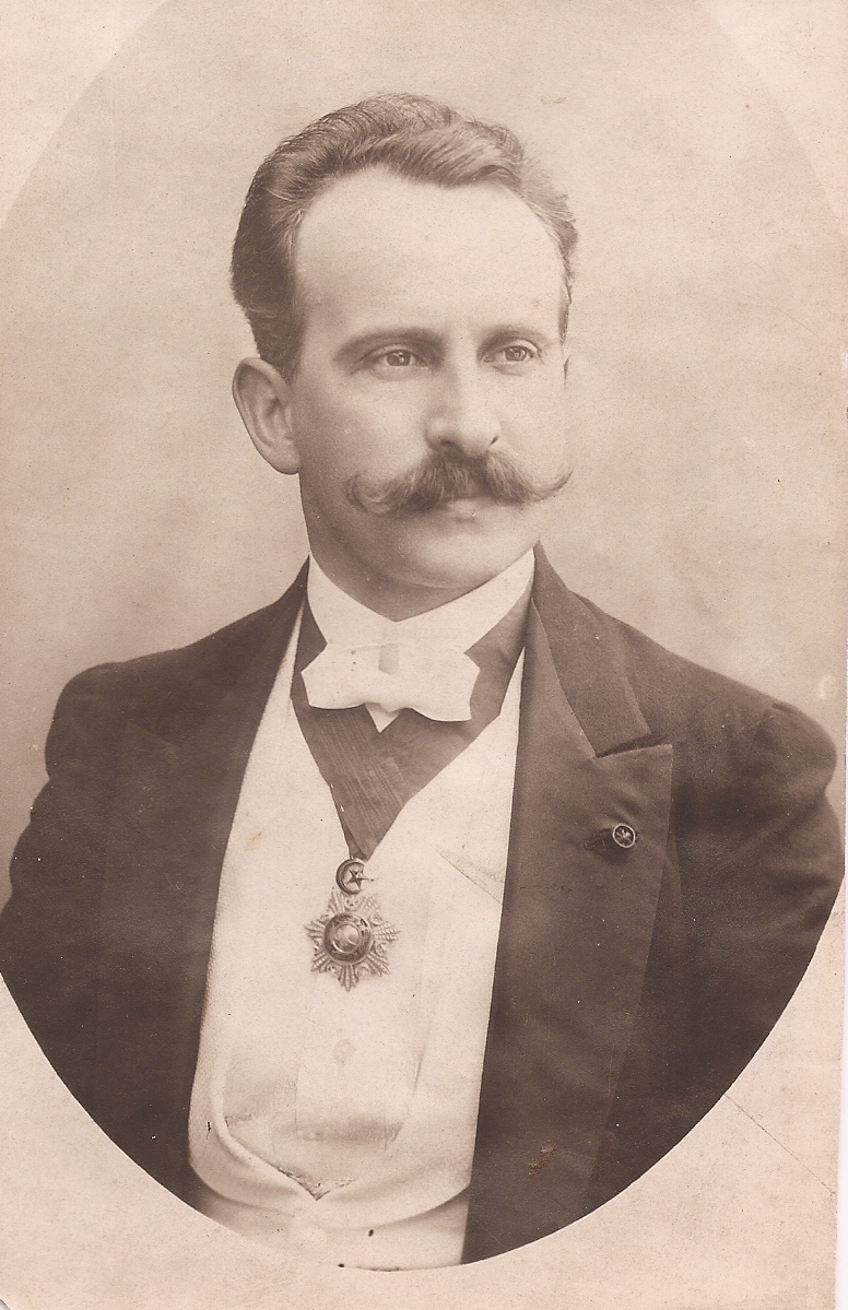 Amedeo Majeroni